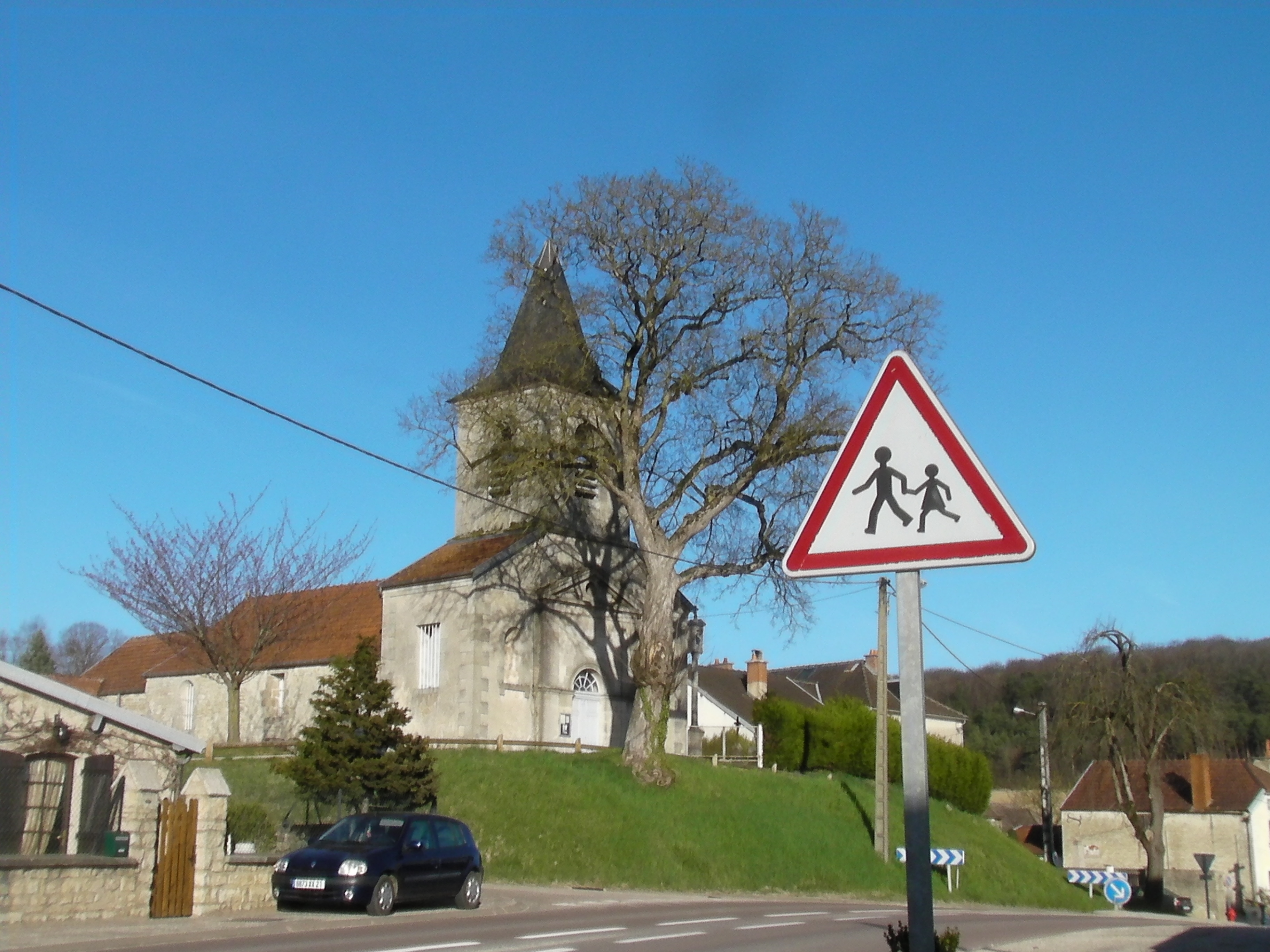 Eglise de villers patras 21